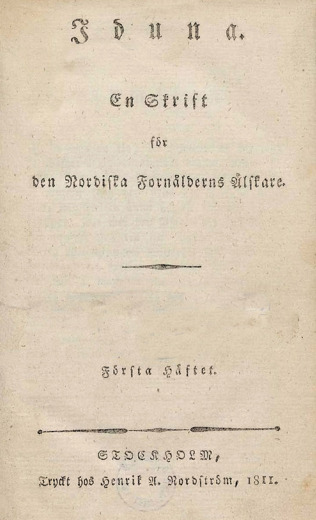 Cover of the periodical Iduna. En skrift för den nordiska fornålderns älskare